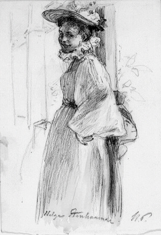 Helga Stenhammar avpoorträtterad av Hanna Pauli från 1800-1alets slut